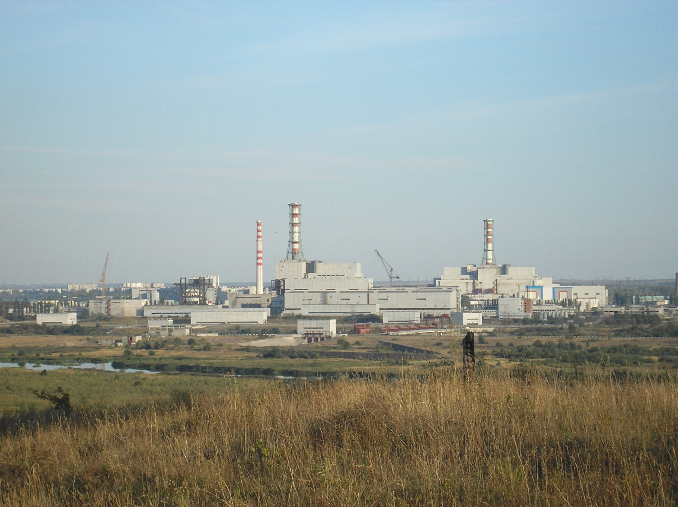 Курская АЭС. Осень 2010